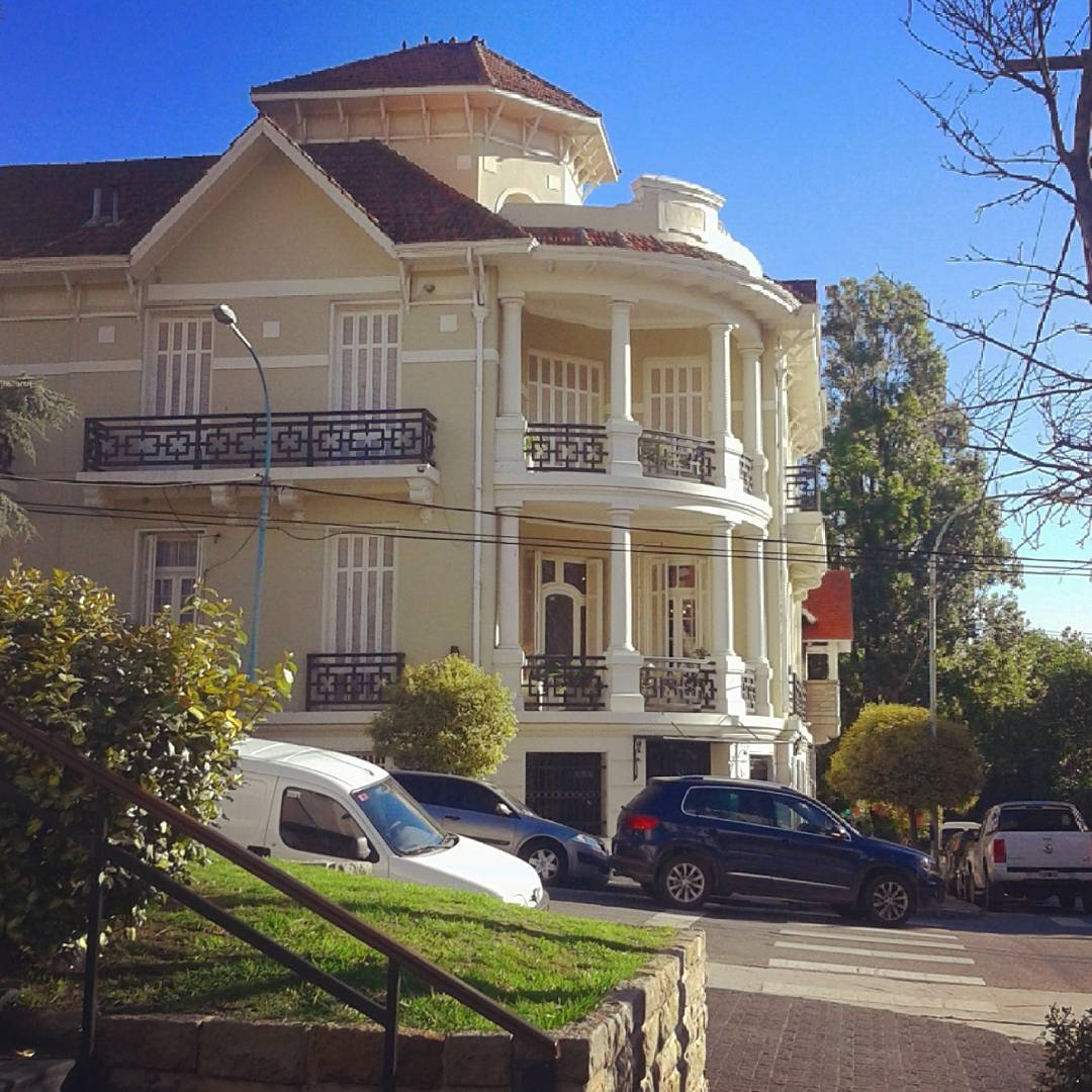 Chalet antiguo sobre calle guemes